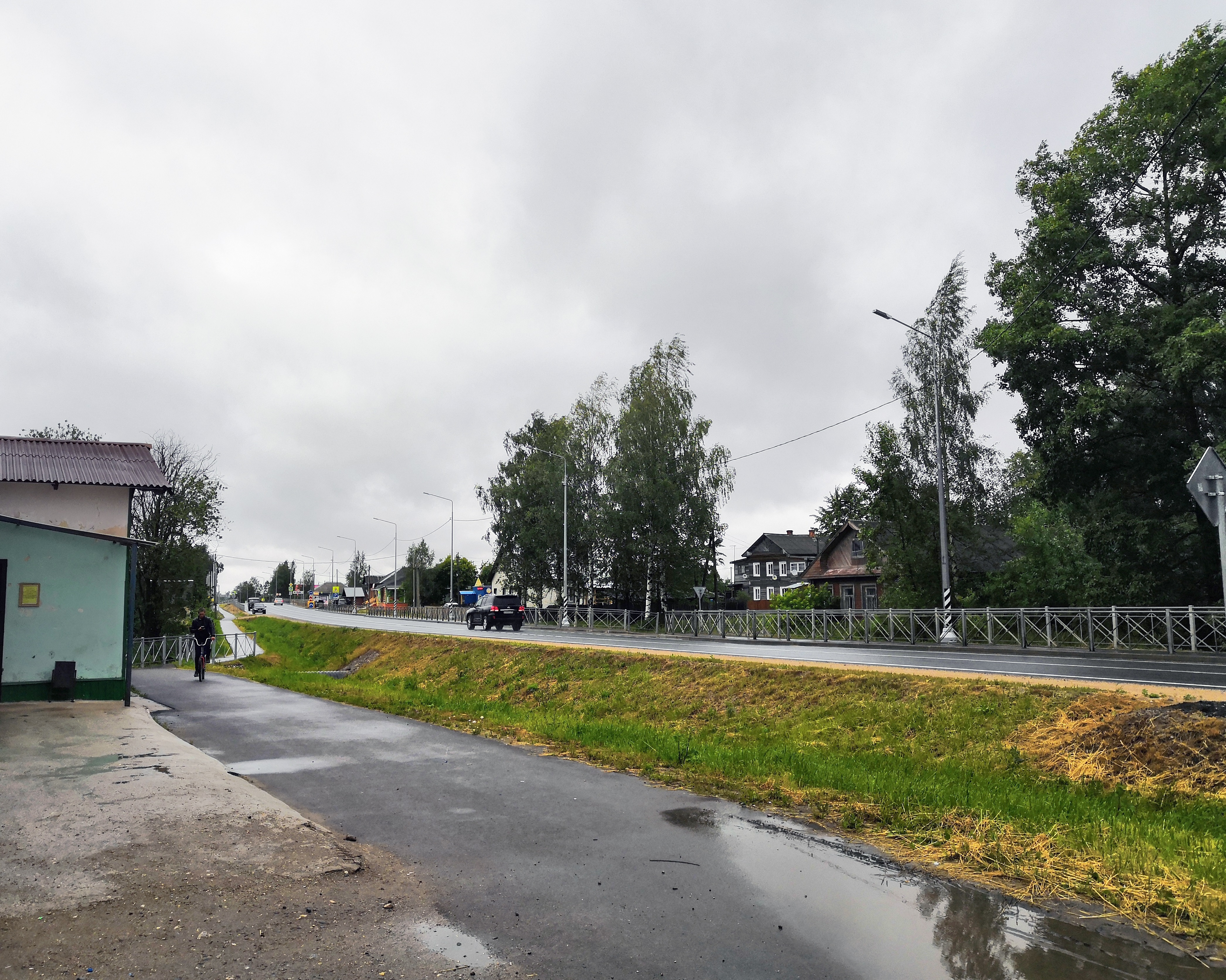 улица Советская (автодорога А119)